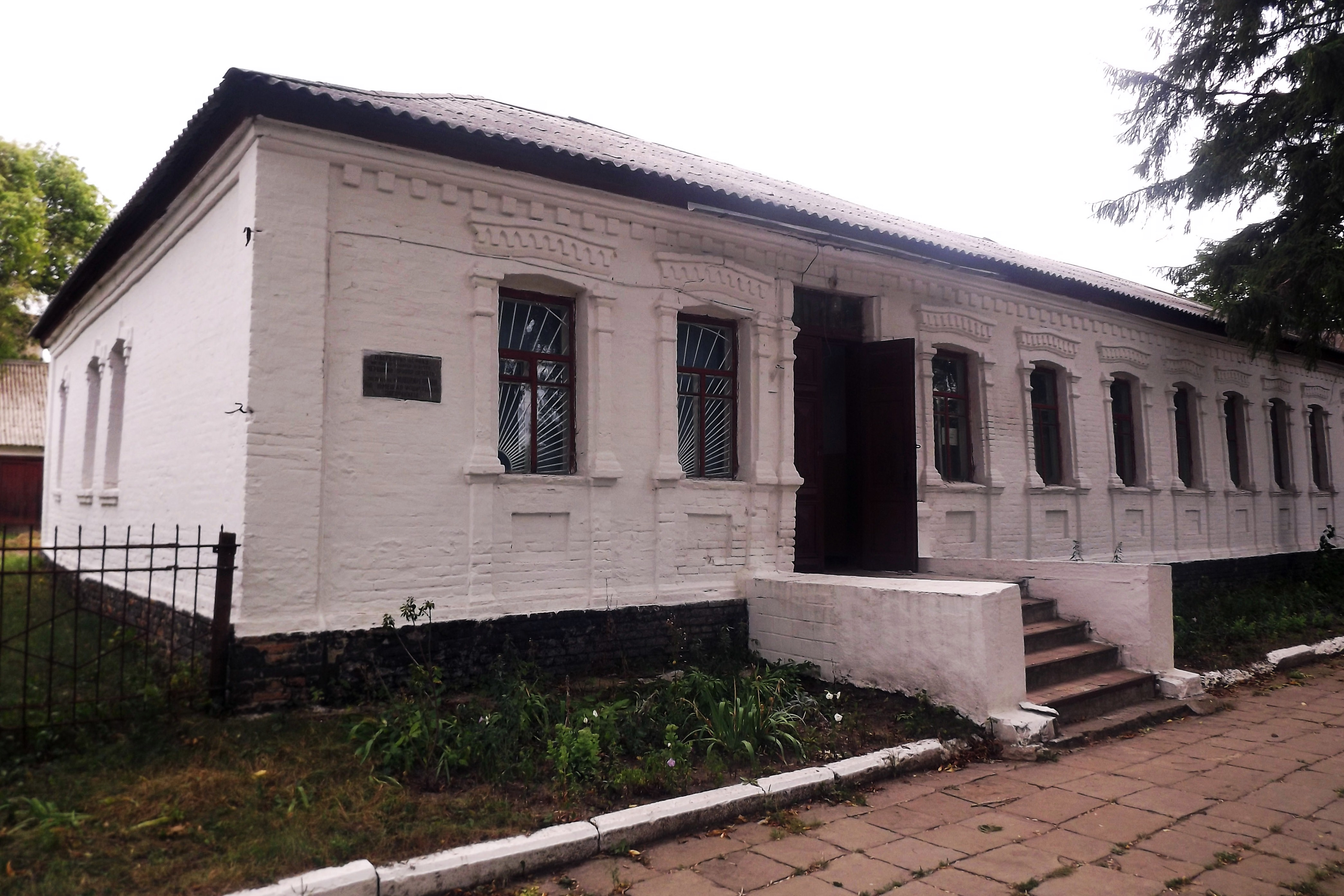 Будинок, на якому було піднято прапор на честь звільнення міста (Новомиргородське районне управління статистики, Кіровоградська область)